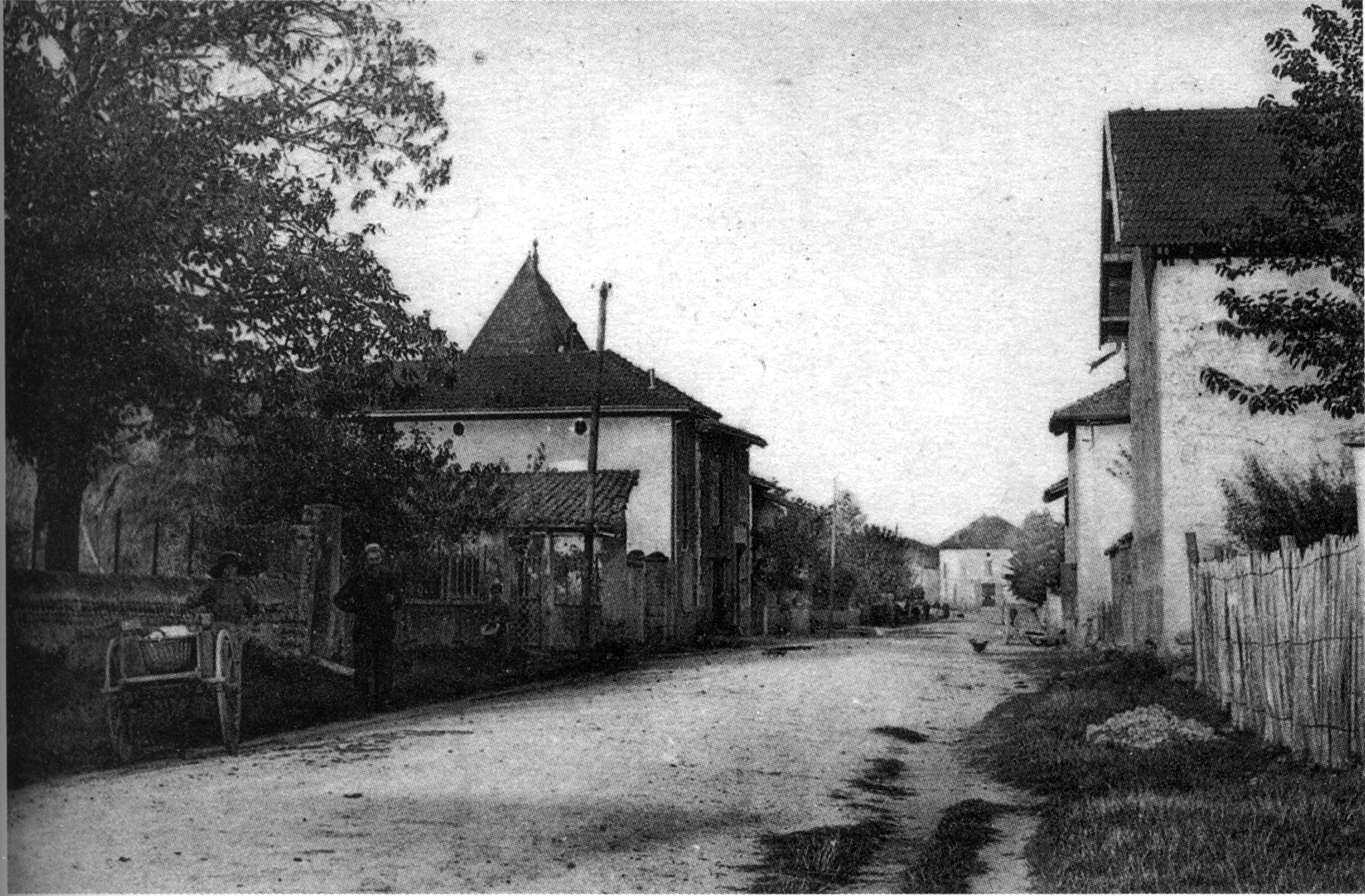 Pajay en 1920